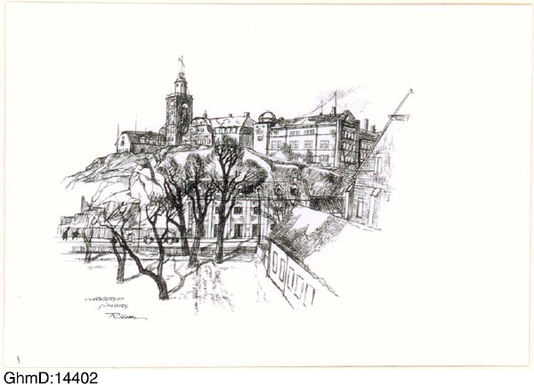 Navigationsskolan och Kvarnbergsskolan i Göteborg, tuschteckning från omkring 1947